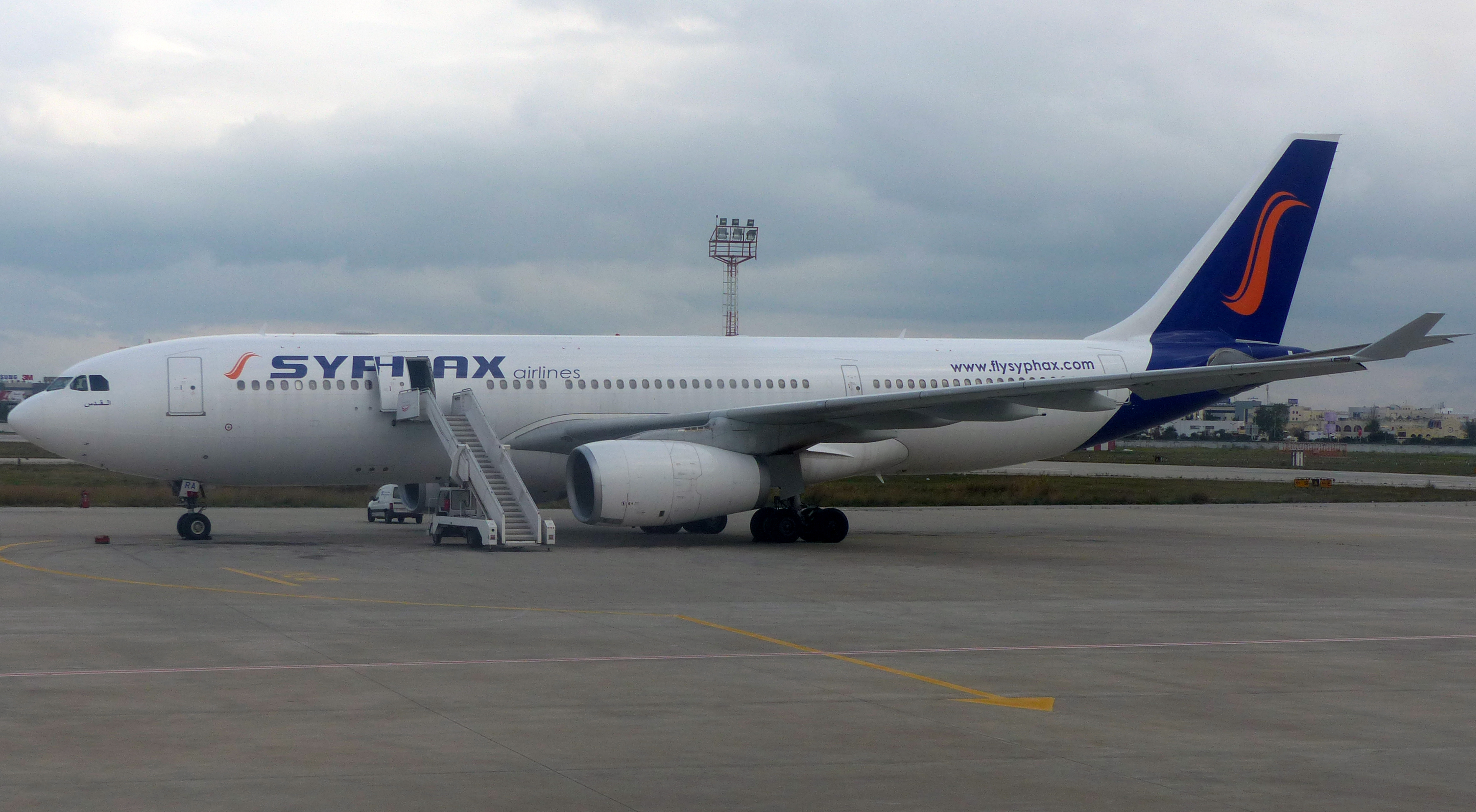 L'Airbus A330-200 de Syphax Airlines qui sera utilisé pour les vols long-courriers à partir de la Tunisie